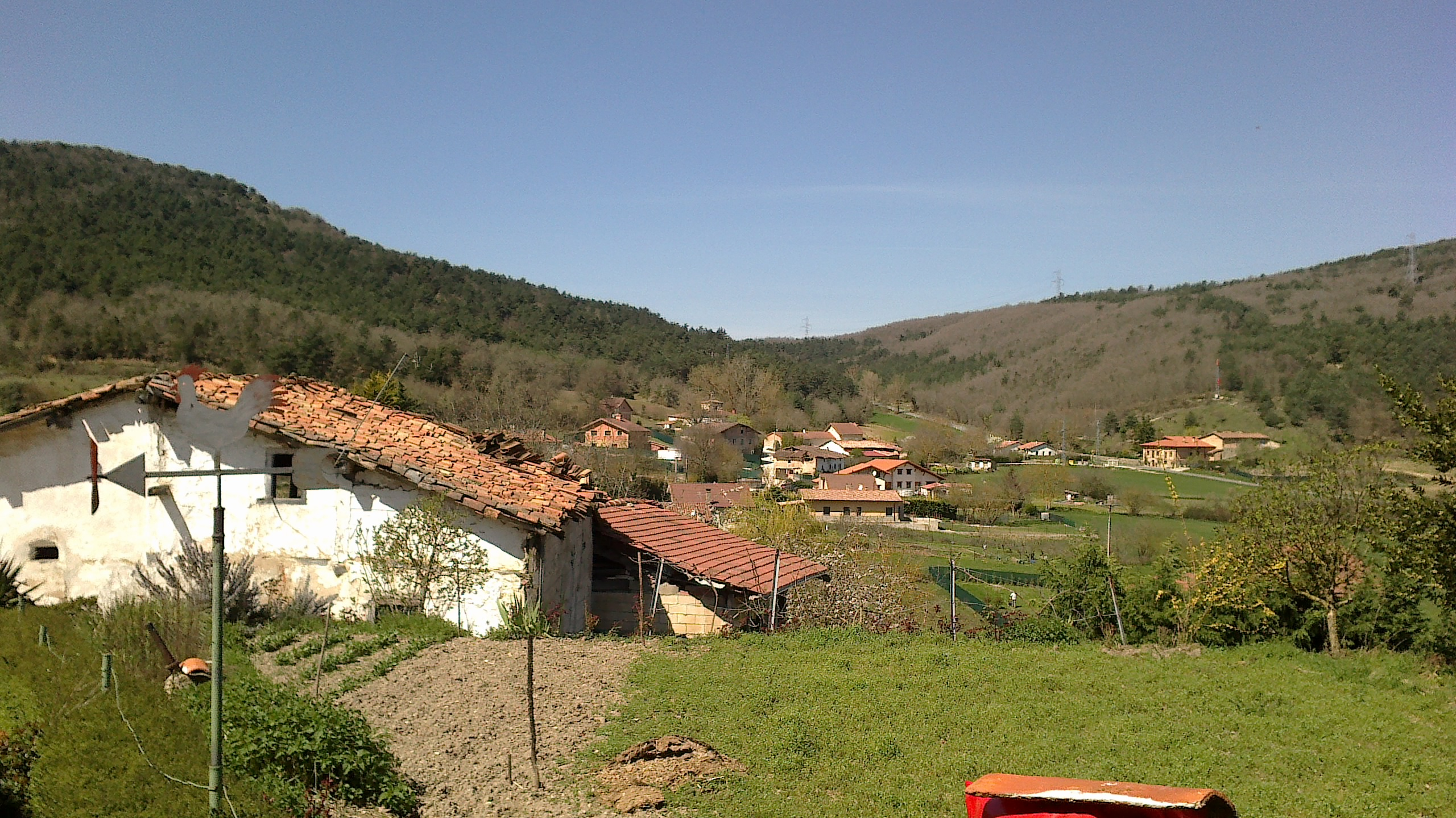 Padul herria (Erriberagoitia, Araba), ekialdetik ikusia